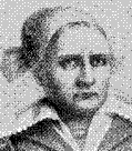 Maria "Kisamor" Jansson Digitaliserad av Projekt Runeberg